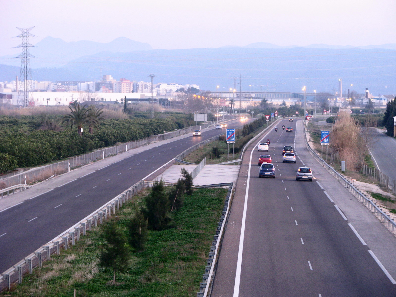 Acceso principal a Alcira (Valencia) desde la A7.